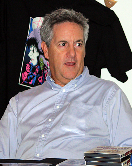 David Naughton auf der 9. Weekend of Horrors in Bottrop (NRW)